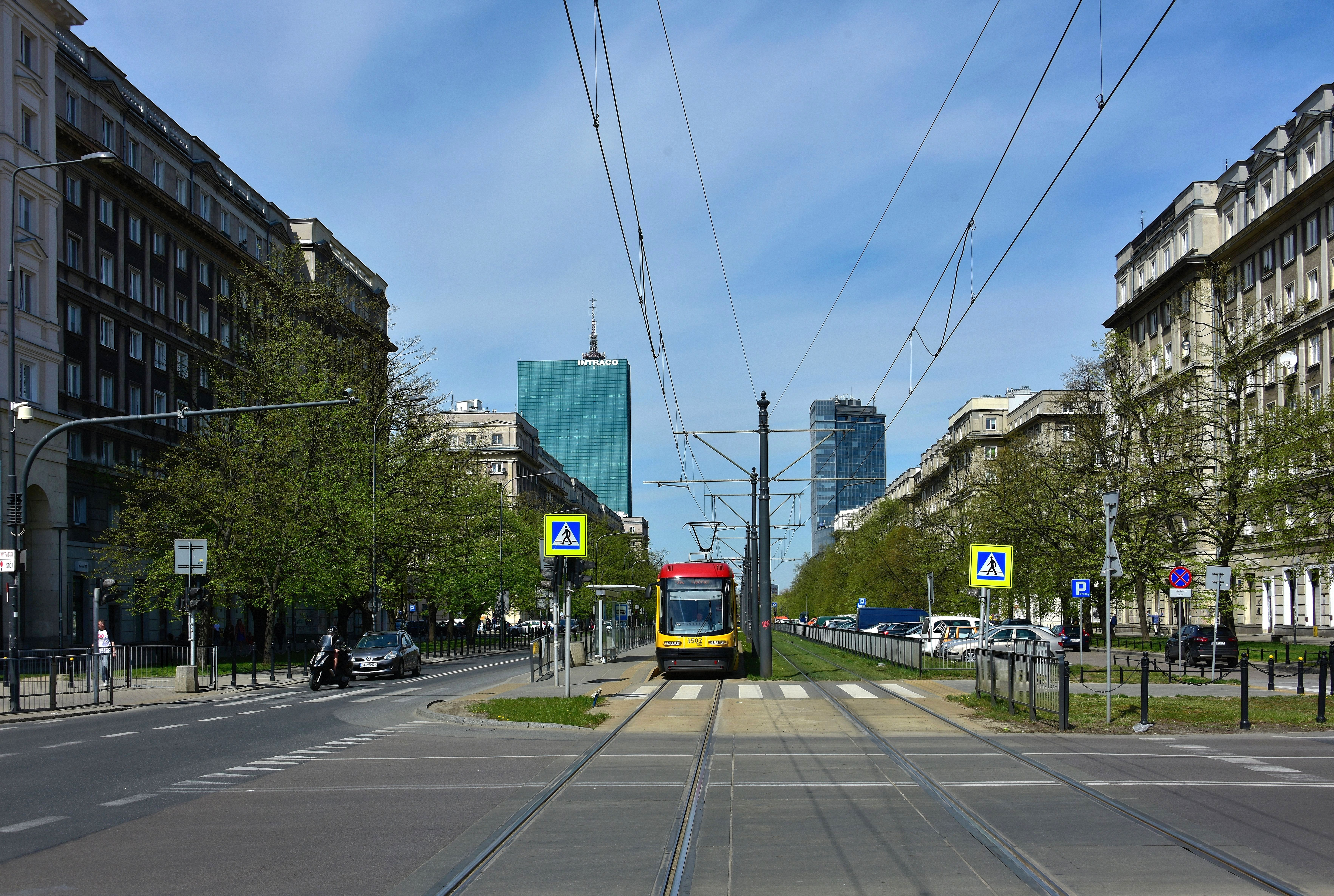 Ulica gen. Władysława Andersa w Warszawie, widok ze skrzyżowania z ul. Mordechaja Anielewicza w kierunku północnym